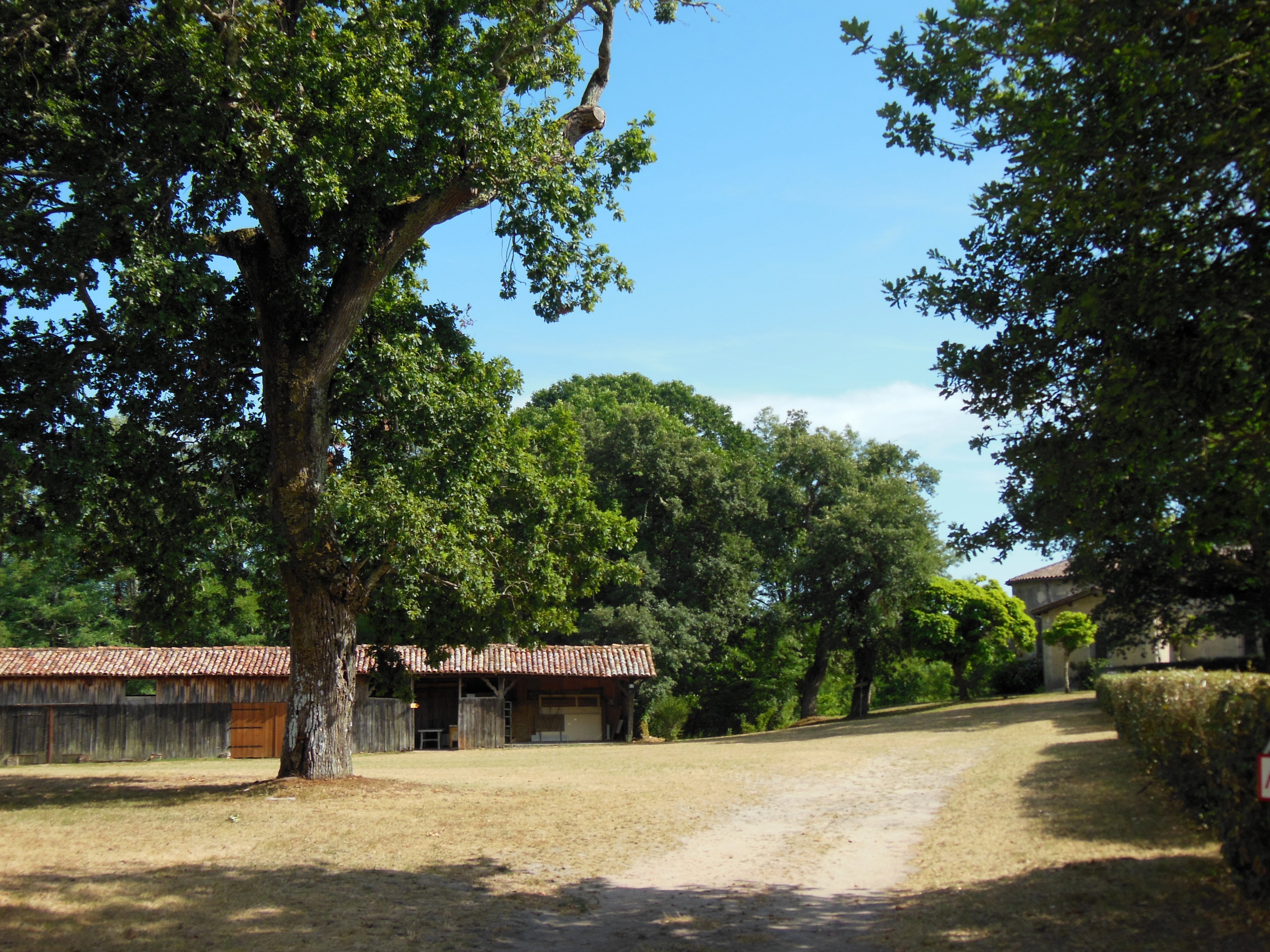 Bouricos (Pontenx-les-Forges, Landes, France), vue de l'airial